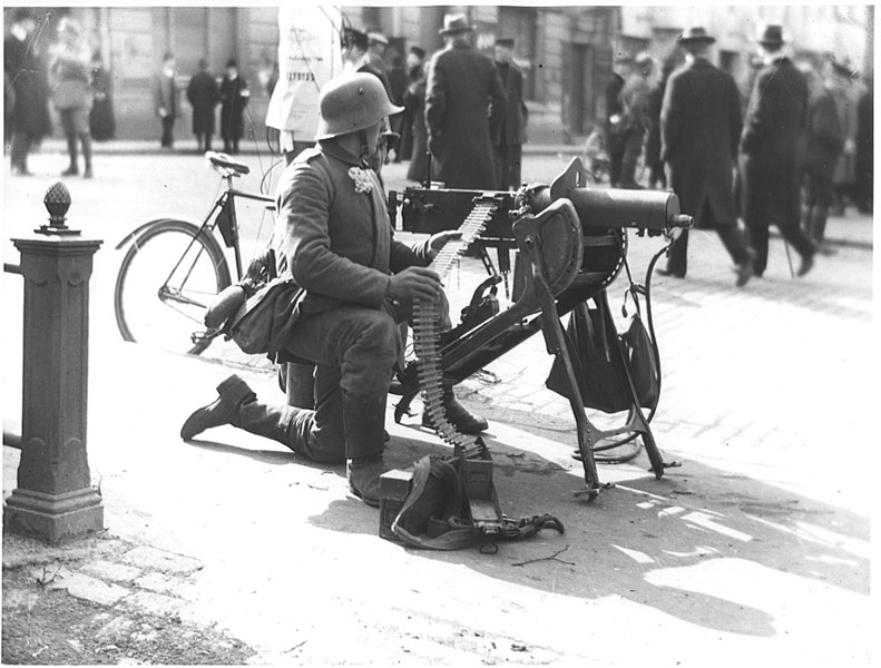 German troops in Helsinki_1918